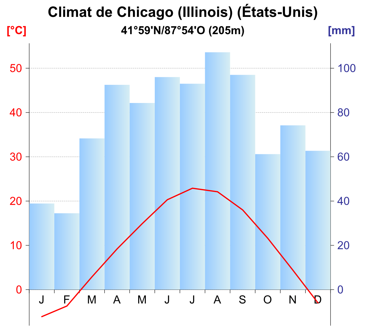 Graphique climatique de Chicago : =Chicago (Illinois) (41°59'N/87°54W, 205 mètres)